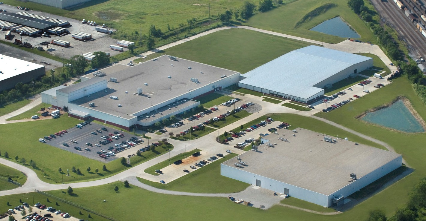 ThyssenKrupp Presta Danville